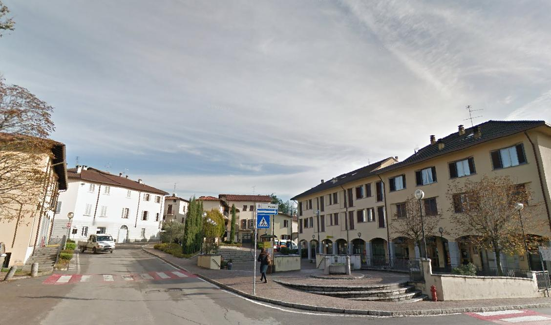 piazza aldo moro bulciago